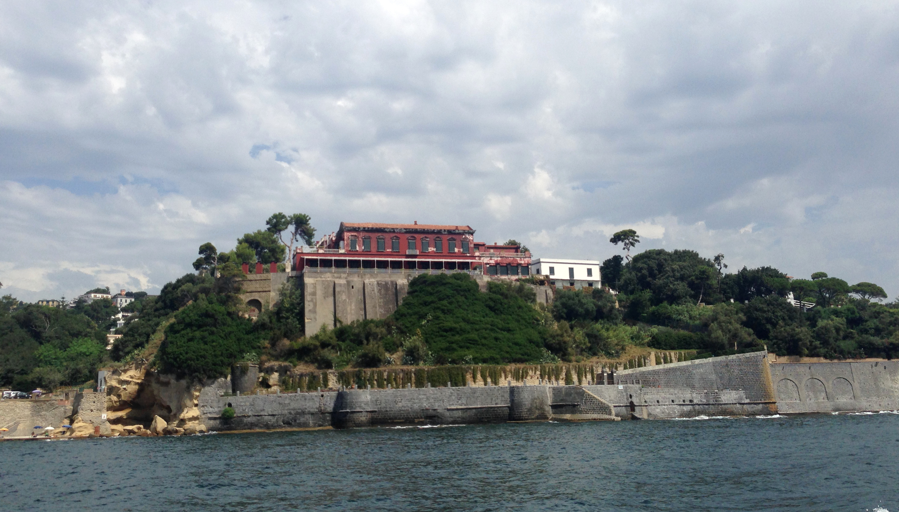 villa Barracco (nota anche come villa Emma) a Posillipo vista dal mare